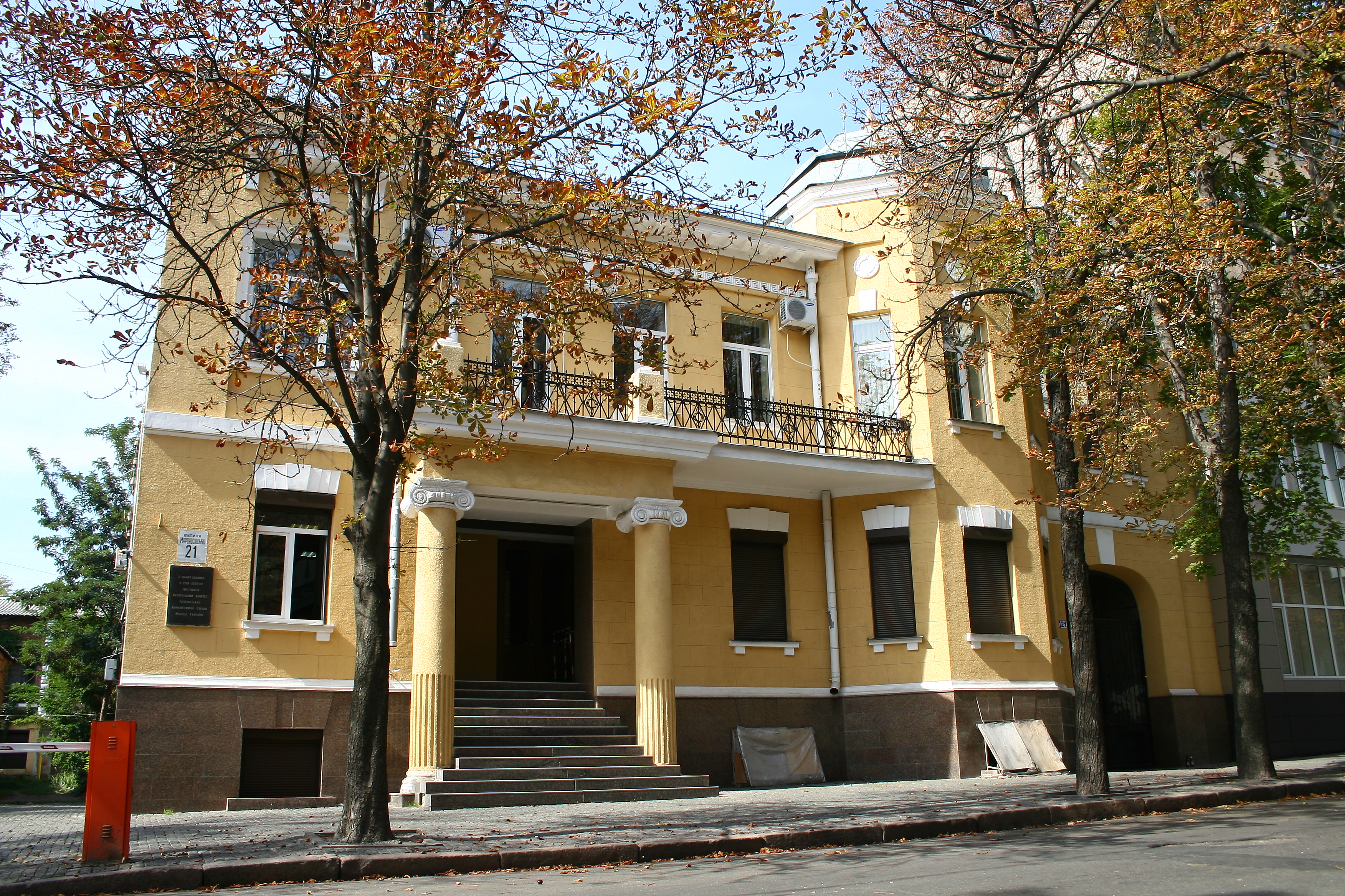 Будинок, у якому містився ЦК КСРМ України